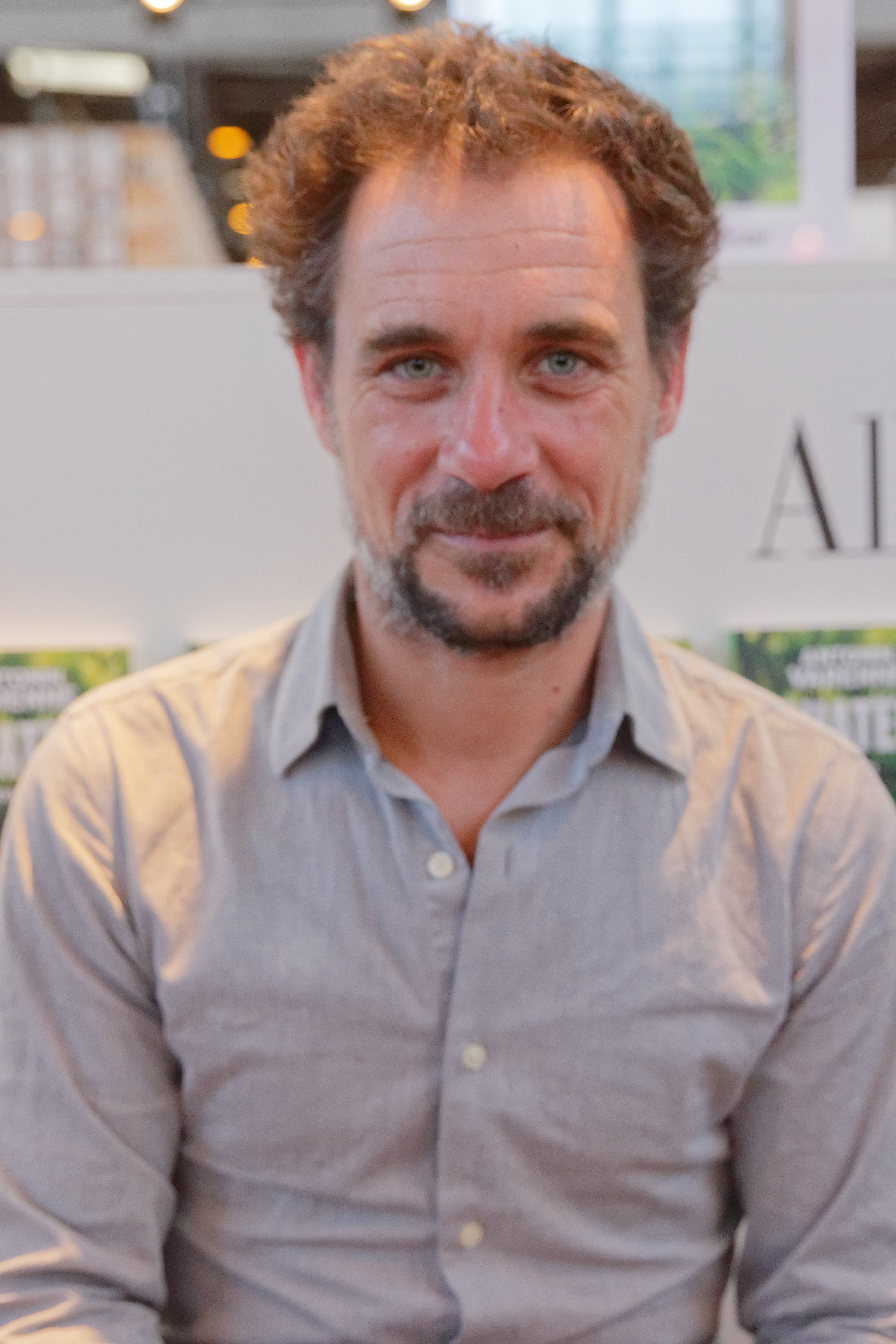 Antonin Varenne en dédicace lors du salon du livre de Paris 2017.